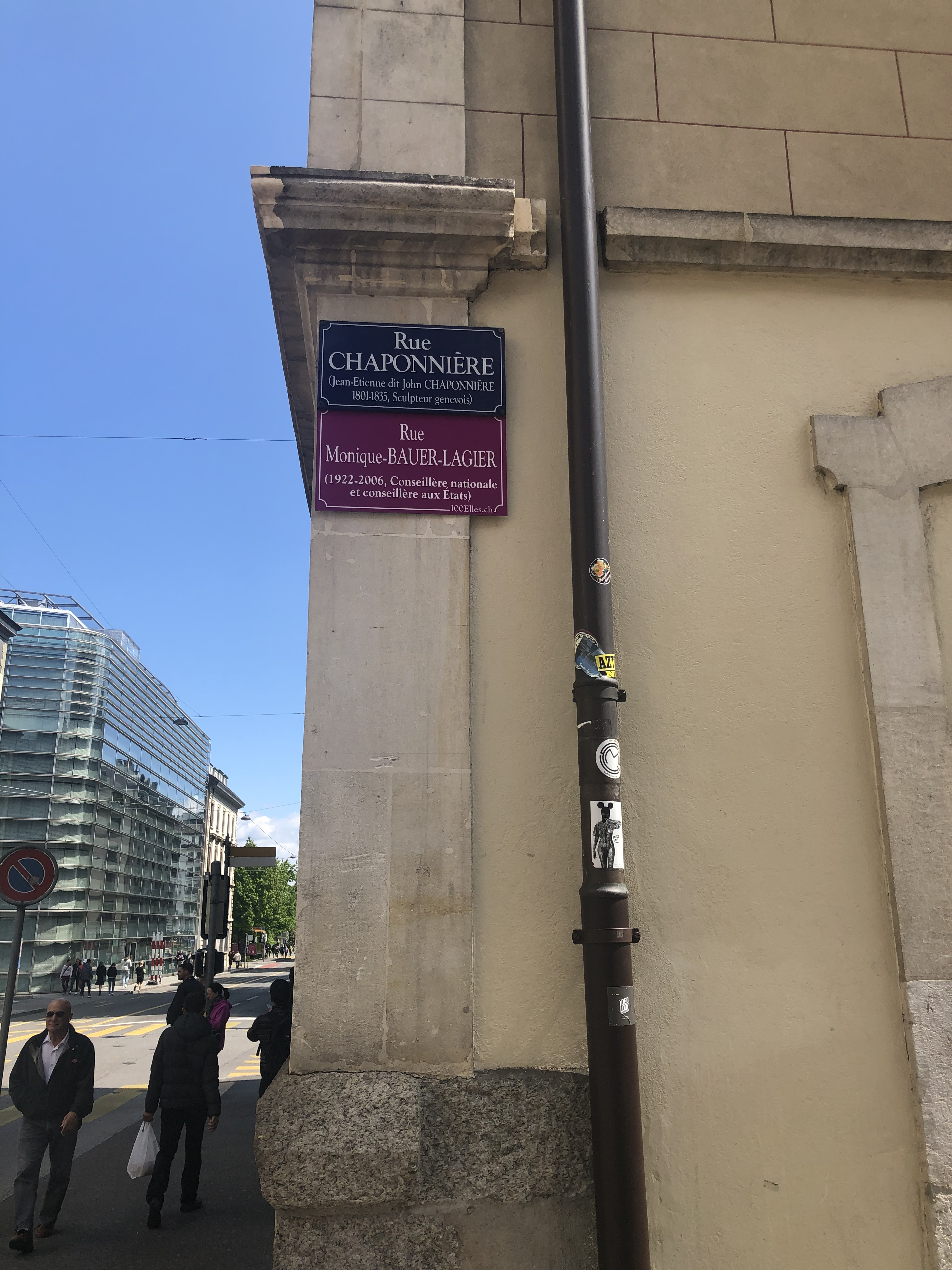 affichage temporaire des femmes remarquables de Genève 100elles.ch projet de l’association escouade